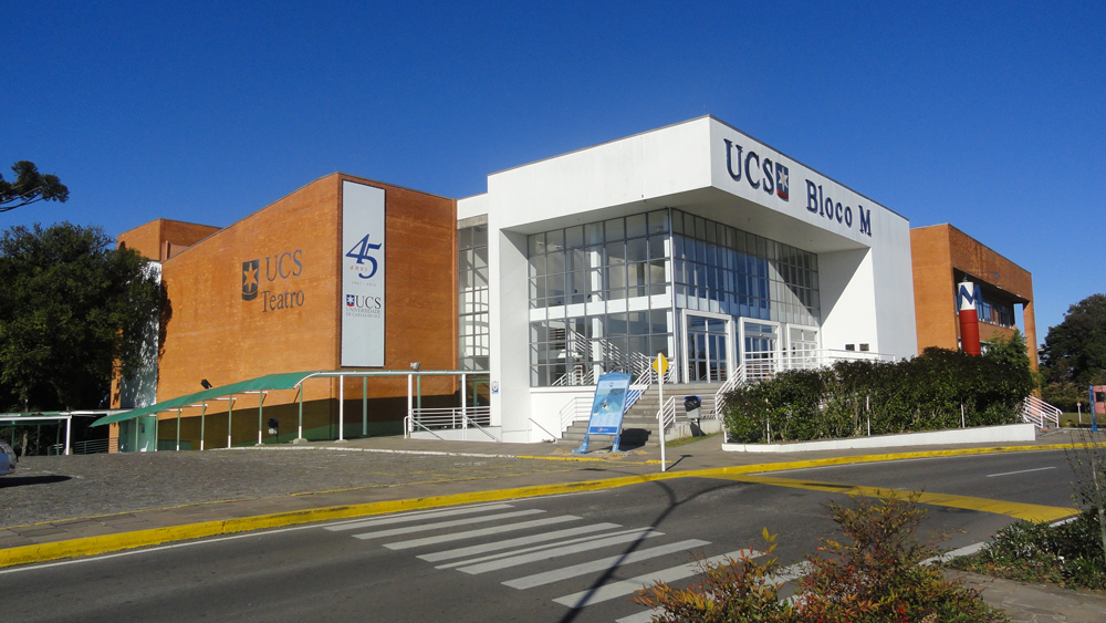 Teatro da Universidade de Caxias do Sul